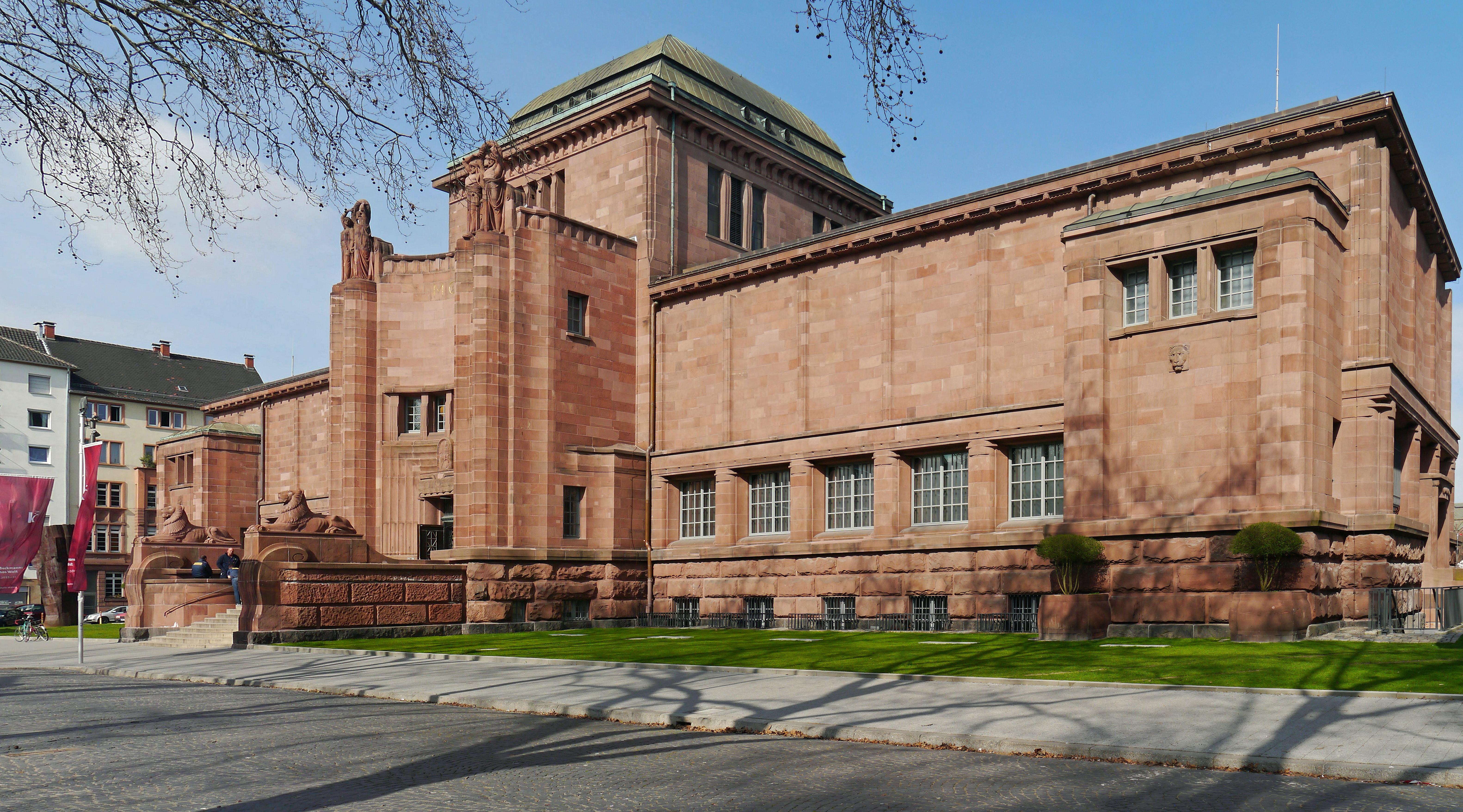 Die Kunsthalle Mannheim. Hauptportal Altbau.